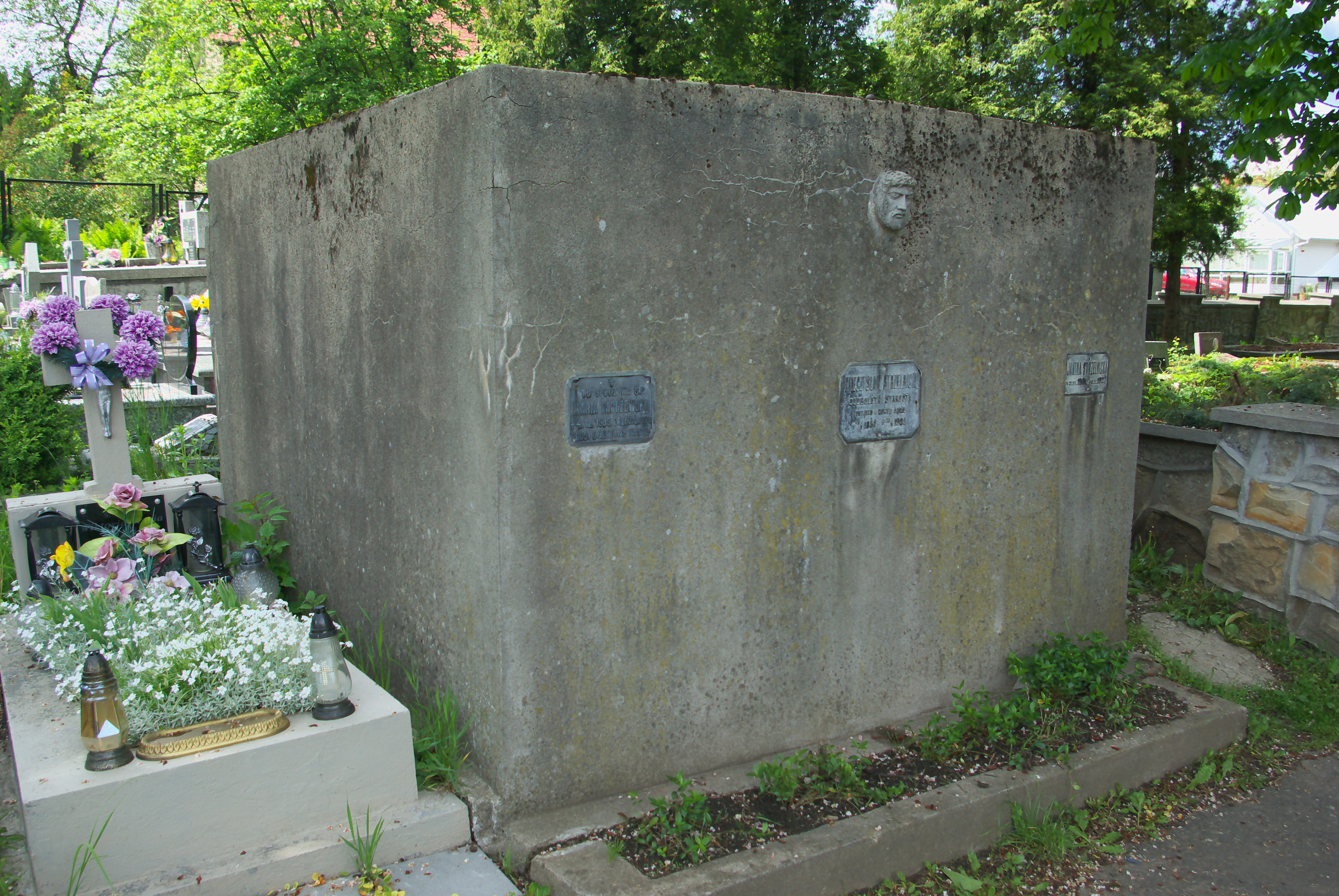 Grobowiec Strzelbickich na Cmentarzu Centralnym w Sanoku.